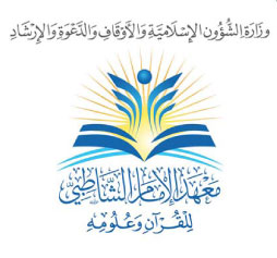 معهد الإمام الشاطبي